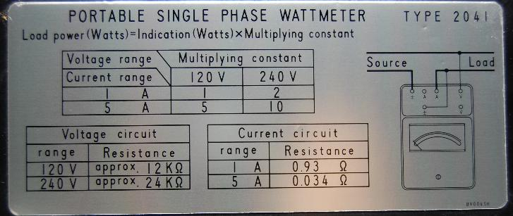 Wattmeter